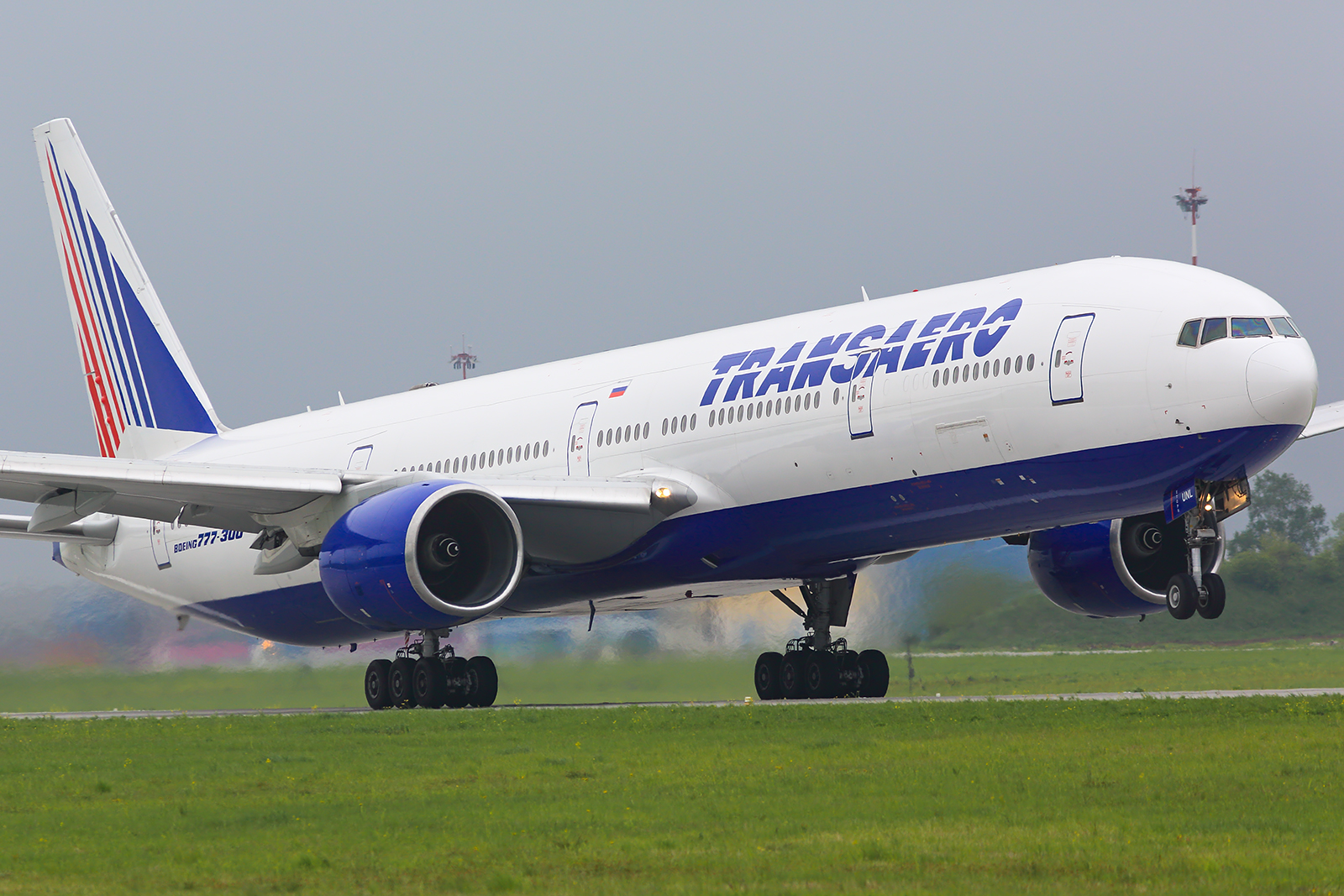 Boeing 777-300 of Vladivostok Air at Vladivostok Airport